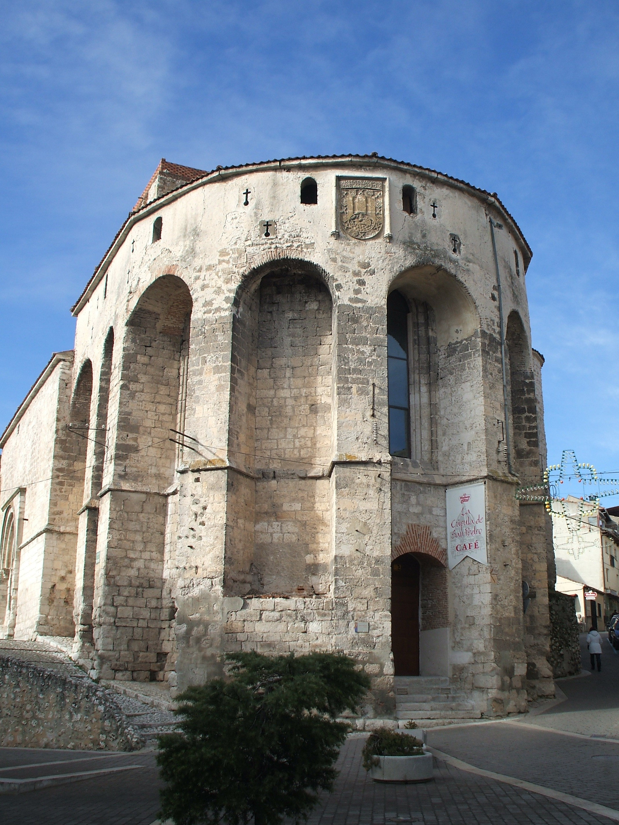 Iglesia de San Pedro (Cuéllar)